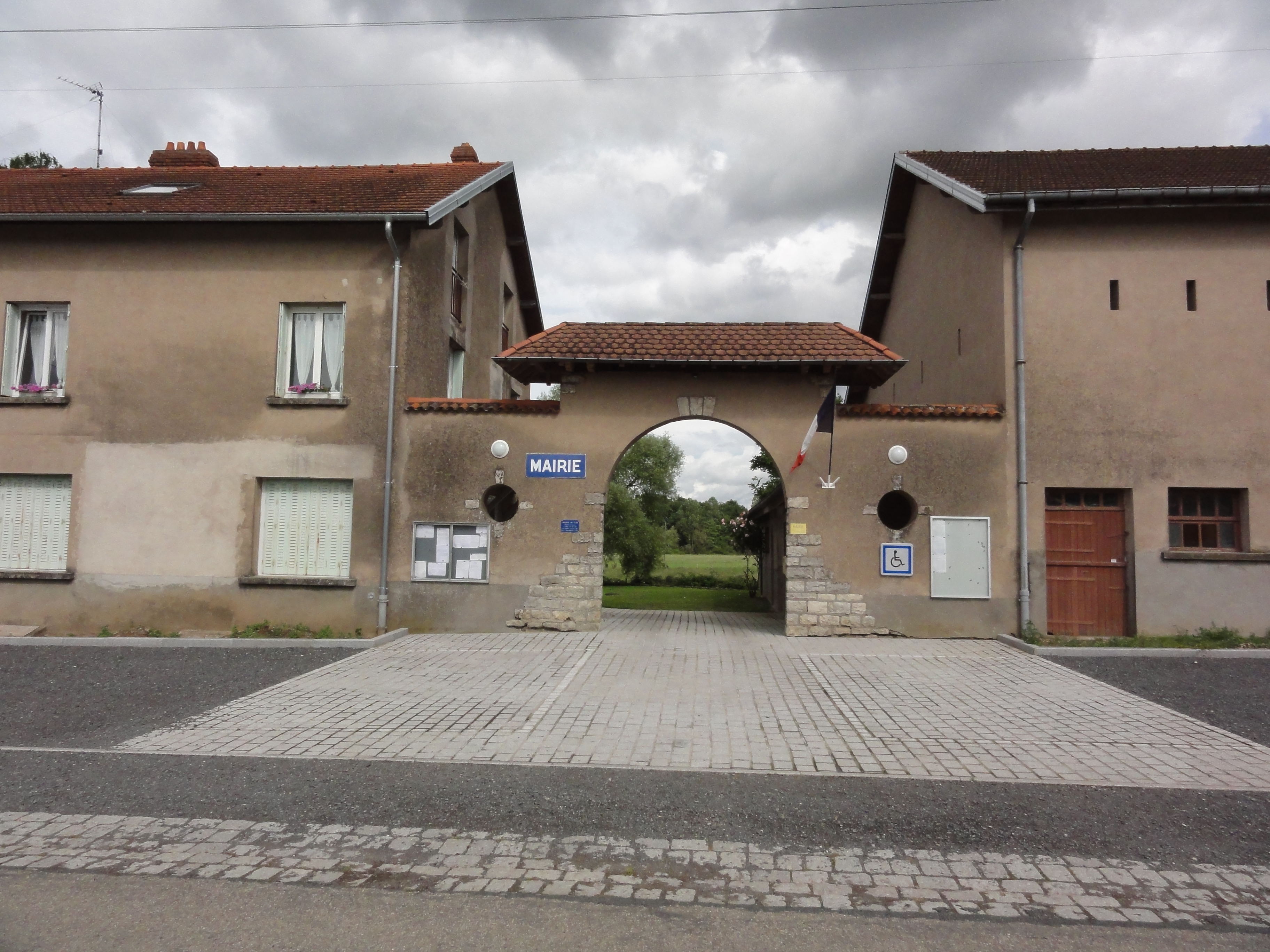 Flin (M-et-M) mairie